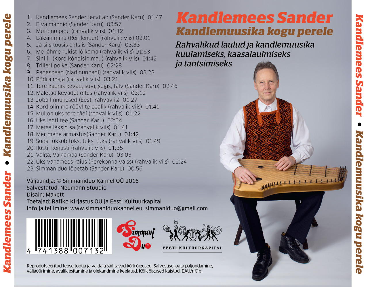 Kandlemees Sander Kandlemuusika kogu perele CD tagakaas